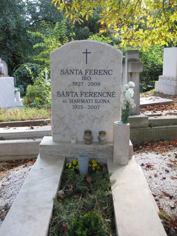 Sánta Ferenc (Brassó, 1927. szeptember 4. – Budapest, 2008. június 6.) Kossuth-díjas magyar író sírja Budapesten. Farkasréti temető: 5/4-1-38.